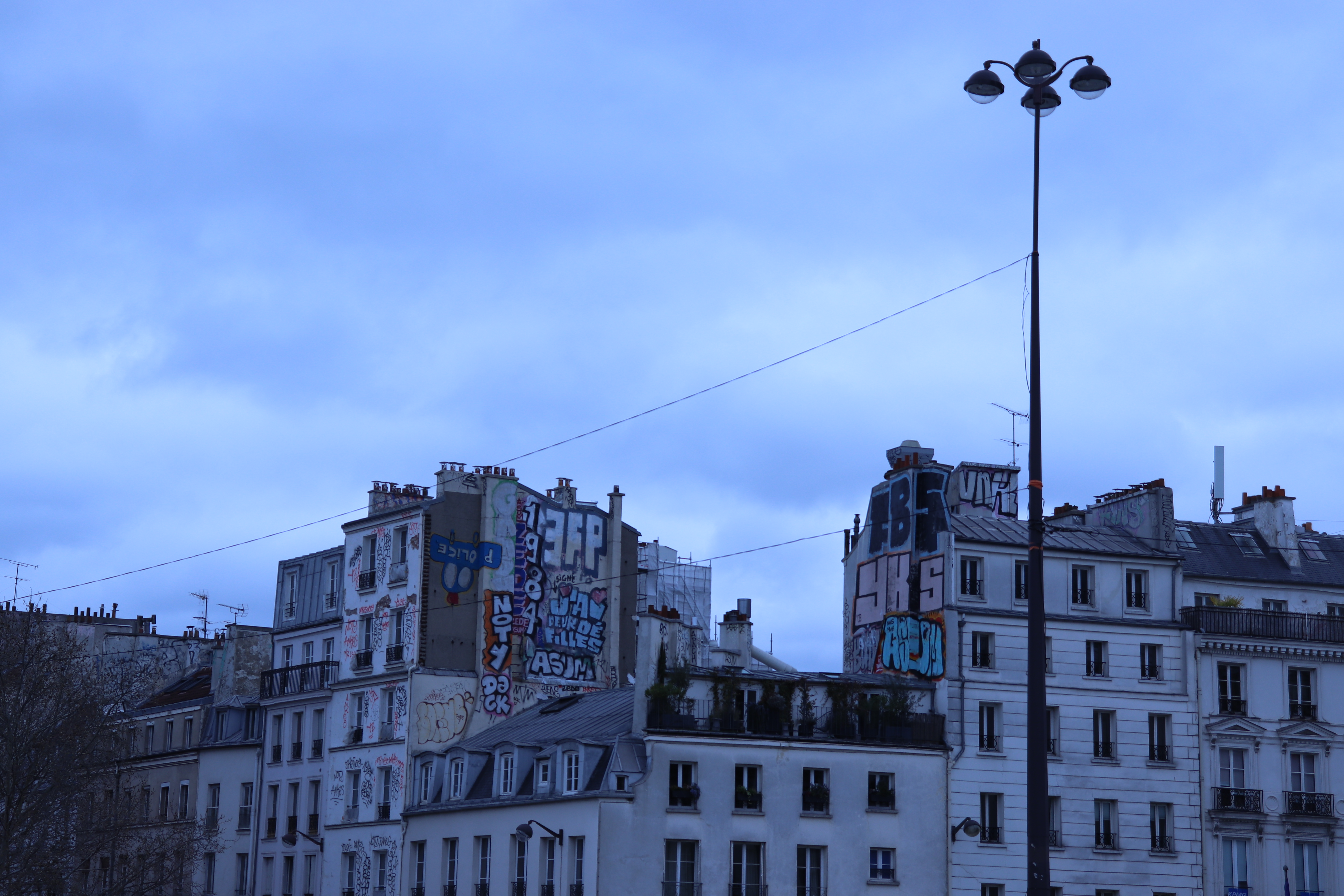 Pariseko etxe batzuetan dauden graffitiak, La Bastilla ondoan.